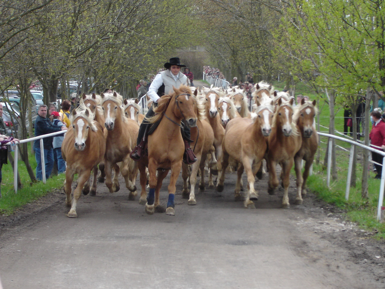 Haflinger-Gestütsparade in Meura, Sommer 2006